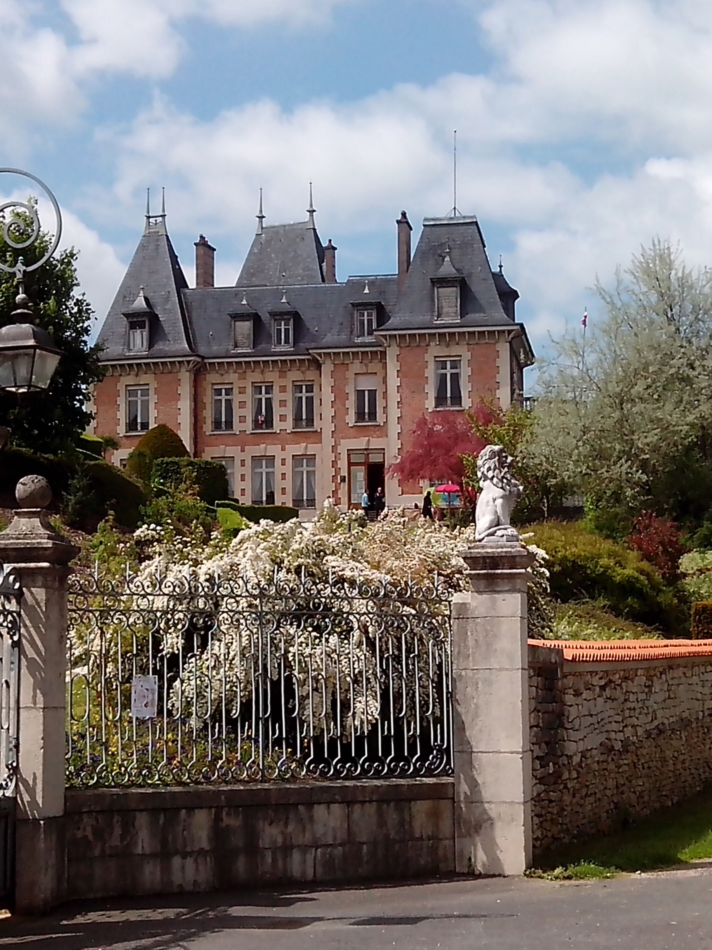 Sampigny (55) Clos Poincaré : La maison de campagne du président Poincaré en pierre et brique, domine le village. Entourée de grilles et d'un jardin à la française en terrasses, avec notamment un parterre de buis taillés. On peut s'y asseoir sur le salon en fer forgé du président, d'où l'on a une superbe vue panoramique sur la vallée de la Meuse. Sampigny est le village de la mère de Poincaré, qui y possédait une maison. Conformément aux dernières volontés de Raymond Poincaré, un orphelinat de garçons y a été établi le 1er octobre 1947 qui a fonctionné jusqu'en 1981. Il abrite aujourd'hui un musée, propriété du département de la Meuse.